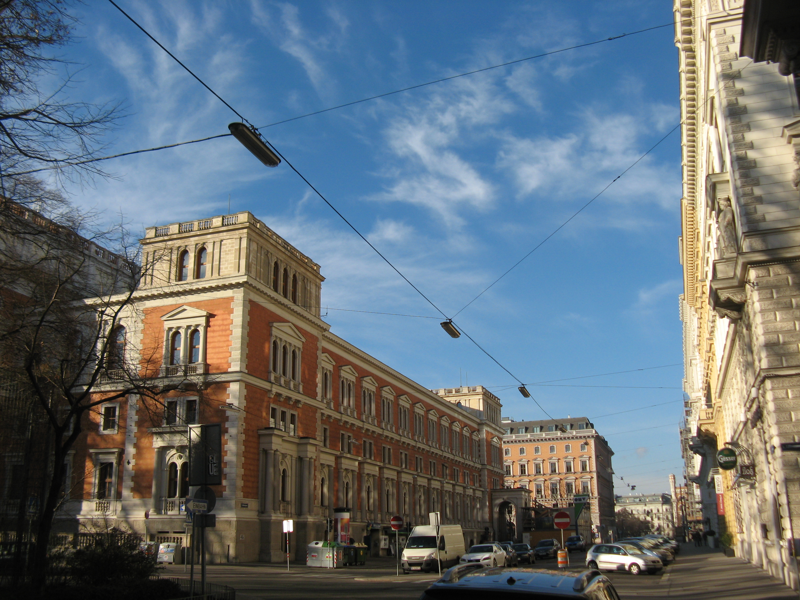 Börsegasse vom Börseplatz Richtung Schottenring, links die Börse, Wien-Innere Stadt